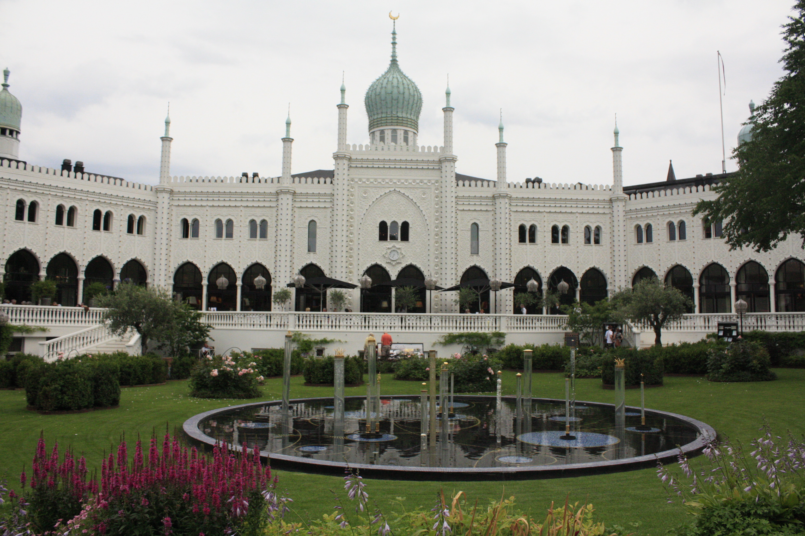 tivoli's castle